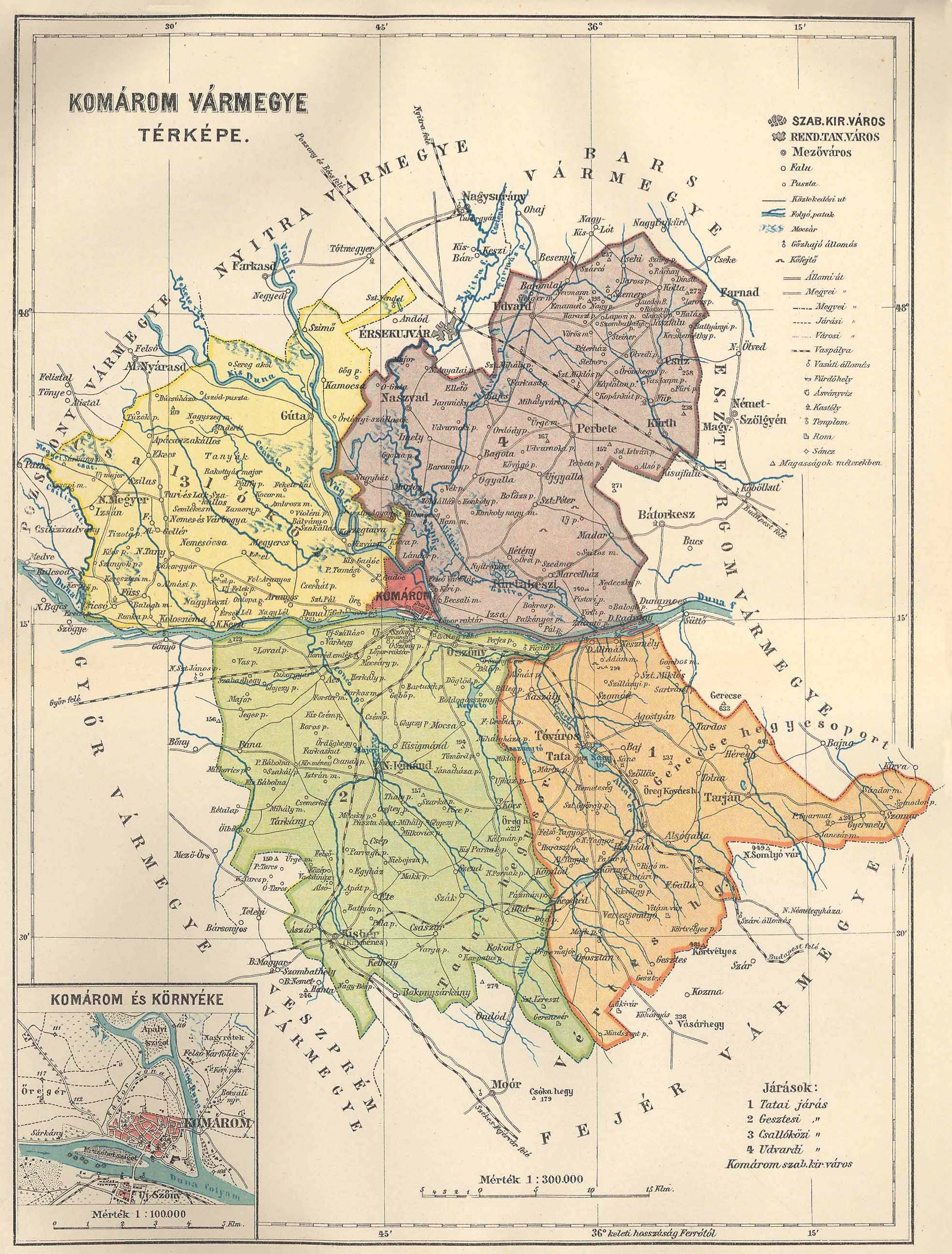 Komárom vármegye térképe Borovszkynál